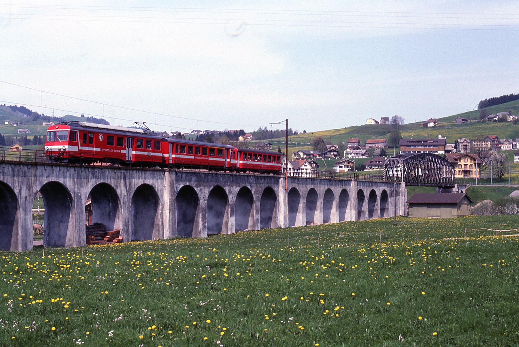 BDeh 4/4 15 und ABt 115 der Appenzeller Bahn im Einsatz bei der SGA auf dem Sitterviadukt in Appenzell, verstärkt durch einen Leichtstahl-B (SIG) der Serien 71-73 und 81-83 der SGA. Dieser Pendelzug war über die AB finanziert worden, aber in der Regel zusammen mit den baugleichen SGA-FAhrzeugen 11-14/111-114 auf der Strecke St. Gallen - Appenzell im Einsatz mit vereinzelten Durchläufen bis Wasserauen. Der Pendelzug trug die Aufschrift "Appenzeller Bahnen", um die Zusammenarbeit AB/SGA zu dokumentieren.